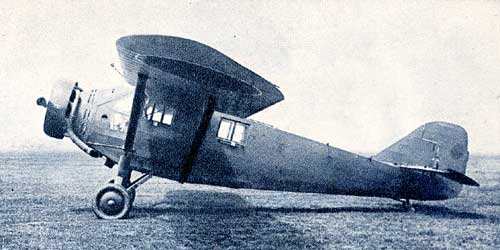 九〇式機上作業練習機二号機（Mitsubishi K3M3）